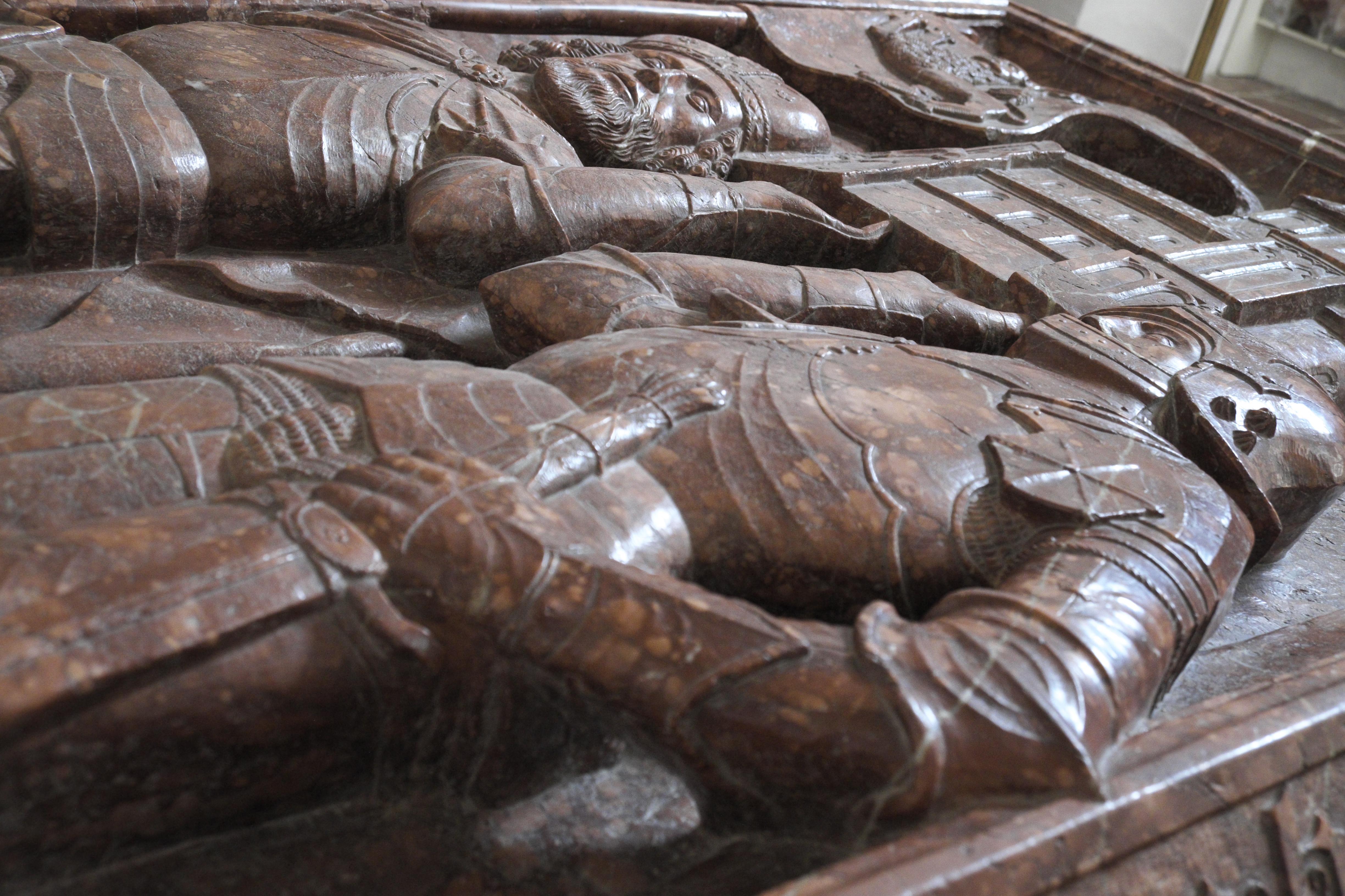 Katholische Pfarrkirche St. Marinus und Anianus, ehemalige Abteikirche des Benediktinerklosters Rott in Rott am Inn im Landkreis Rosenheim (Bayern/Deutschland), Tumba der Stifter Kuno I. von Rott und seines Sohnes Kuno II. von Rott